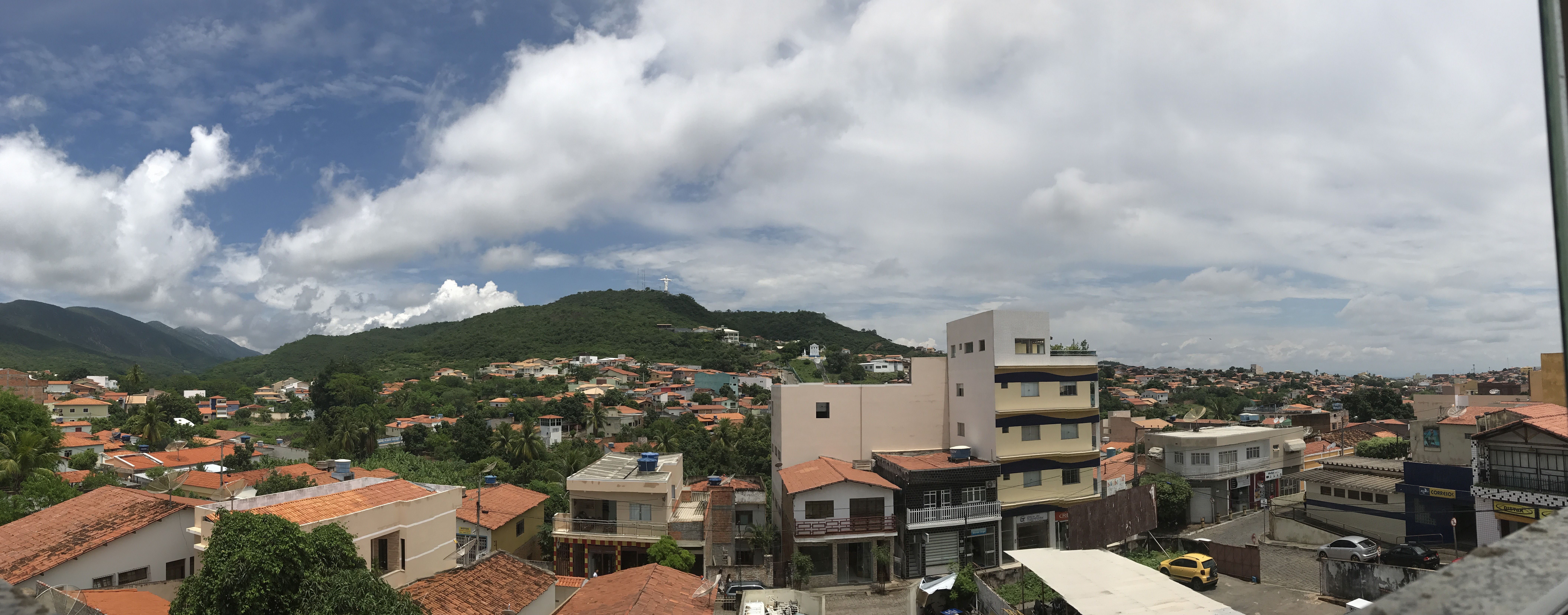 Retrato da Cidade com o cristo no morro